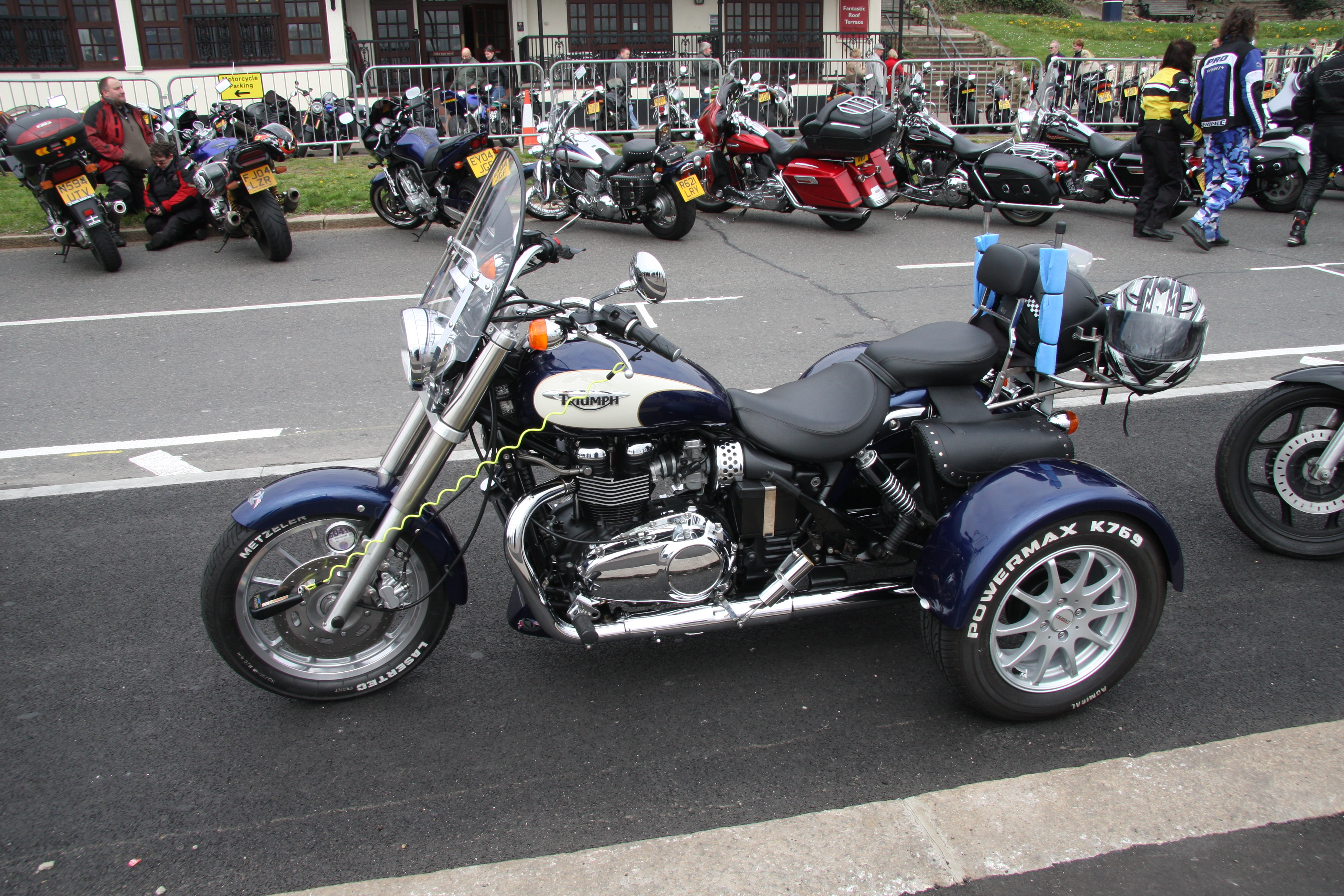 Triumph trike